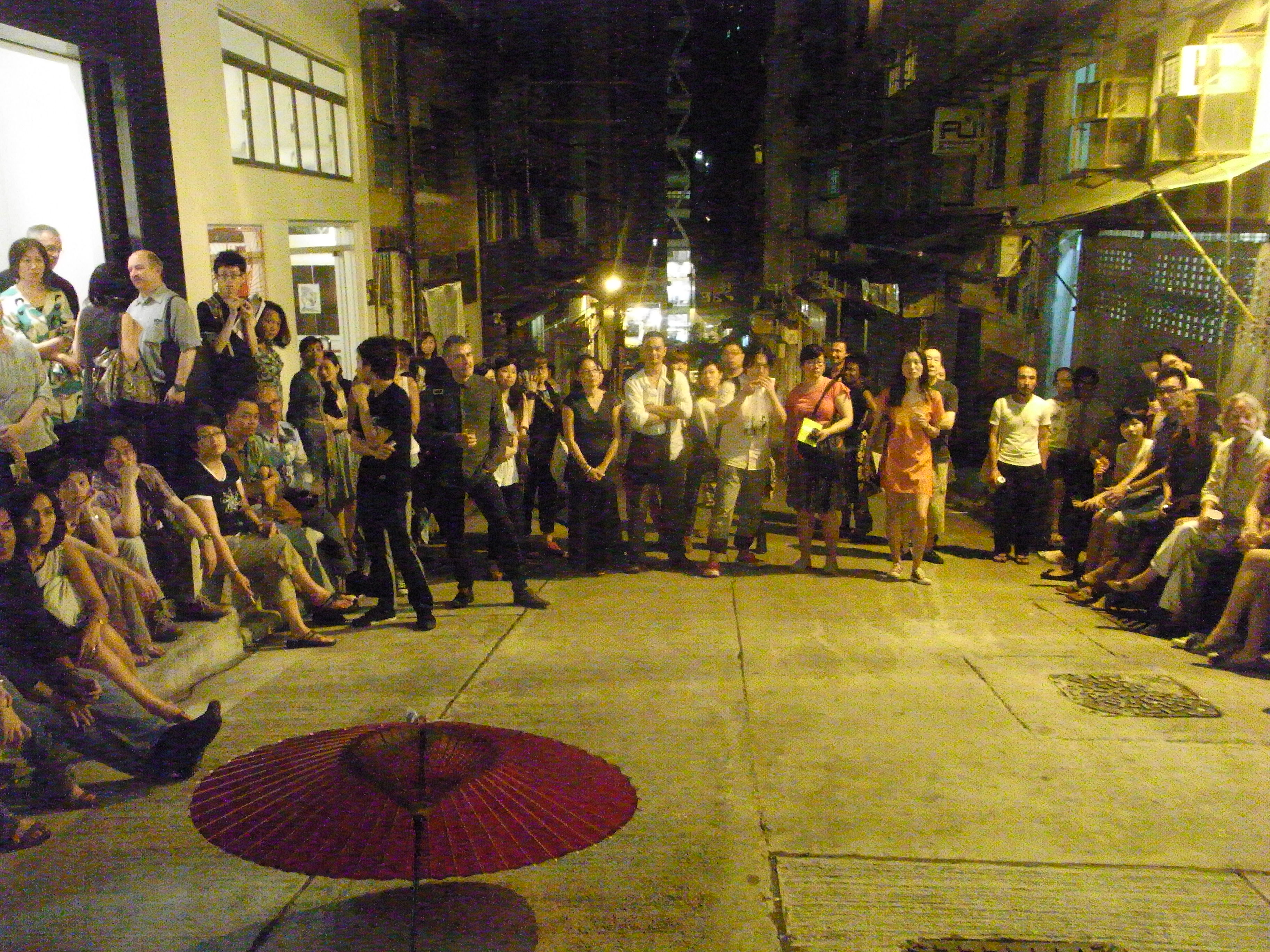 中文（香港）: 上環zh:西街露天音樂會